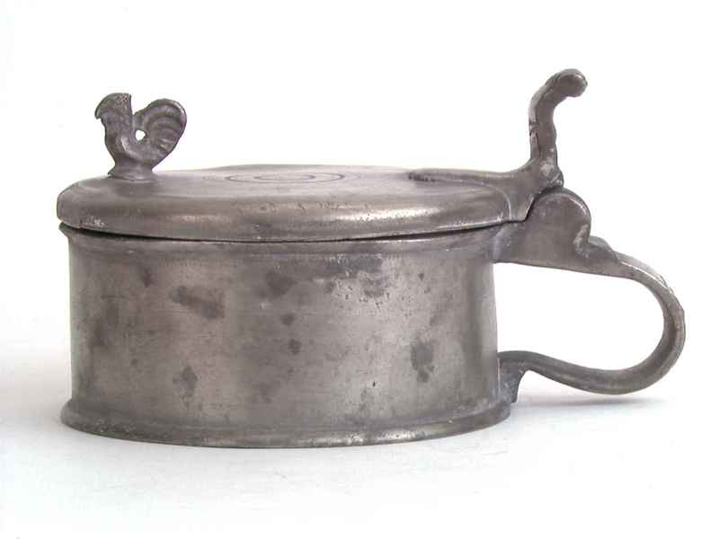 Smørkanne i tinn, datert 1787. Foto Anne-Lise Reinsfelt, Norsk Folkemuseum, NF.1928-0567.